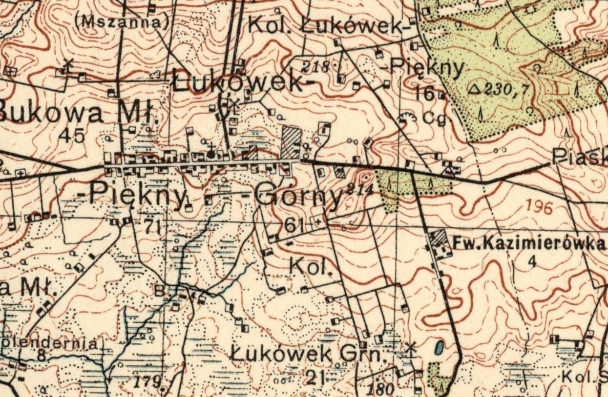 Łukówek na mapie Wojskowego Instytutu Geograficznego z 1933 r.